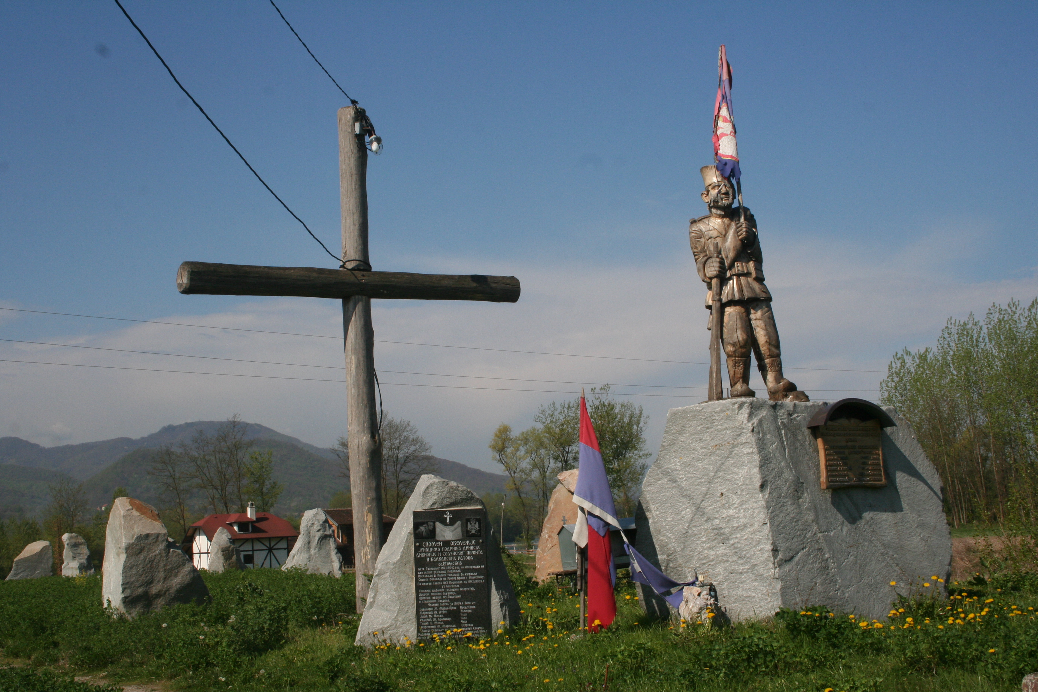 Spomen kompleks ratnicima 1914-1918. Ljubovija